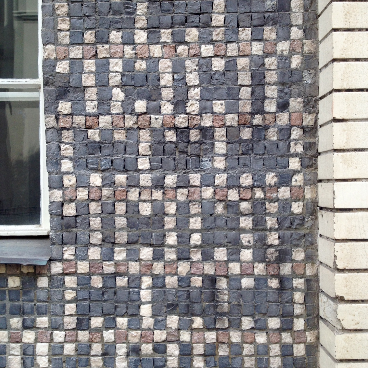 Detail fasády v přízemí